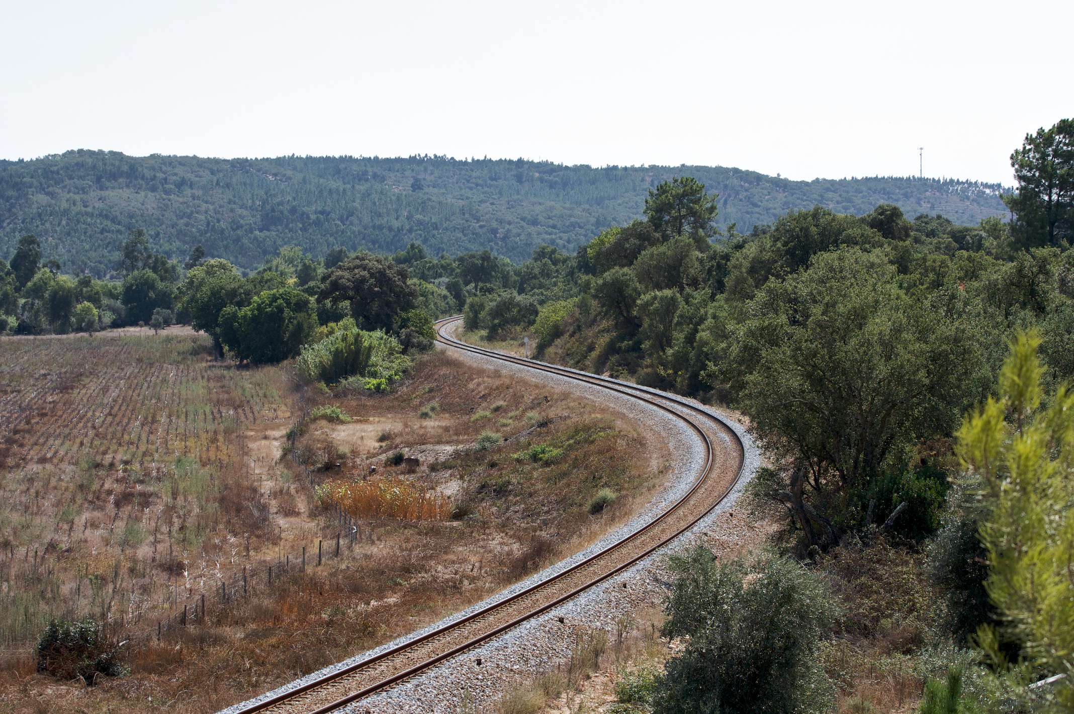 Via férrea: Linha do Leste [PK 142] Local: Bemposta Data e hora: 15 de Setembro de 2009 [12h52] Sentido: Elvas